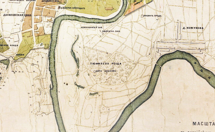 Тюфелева роща на карте 1890 года издания Московской городской думы.